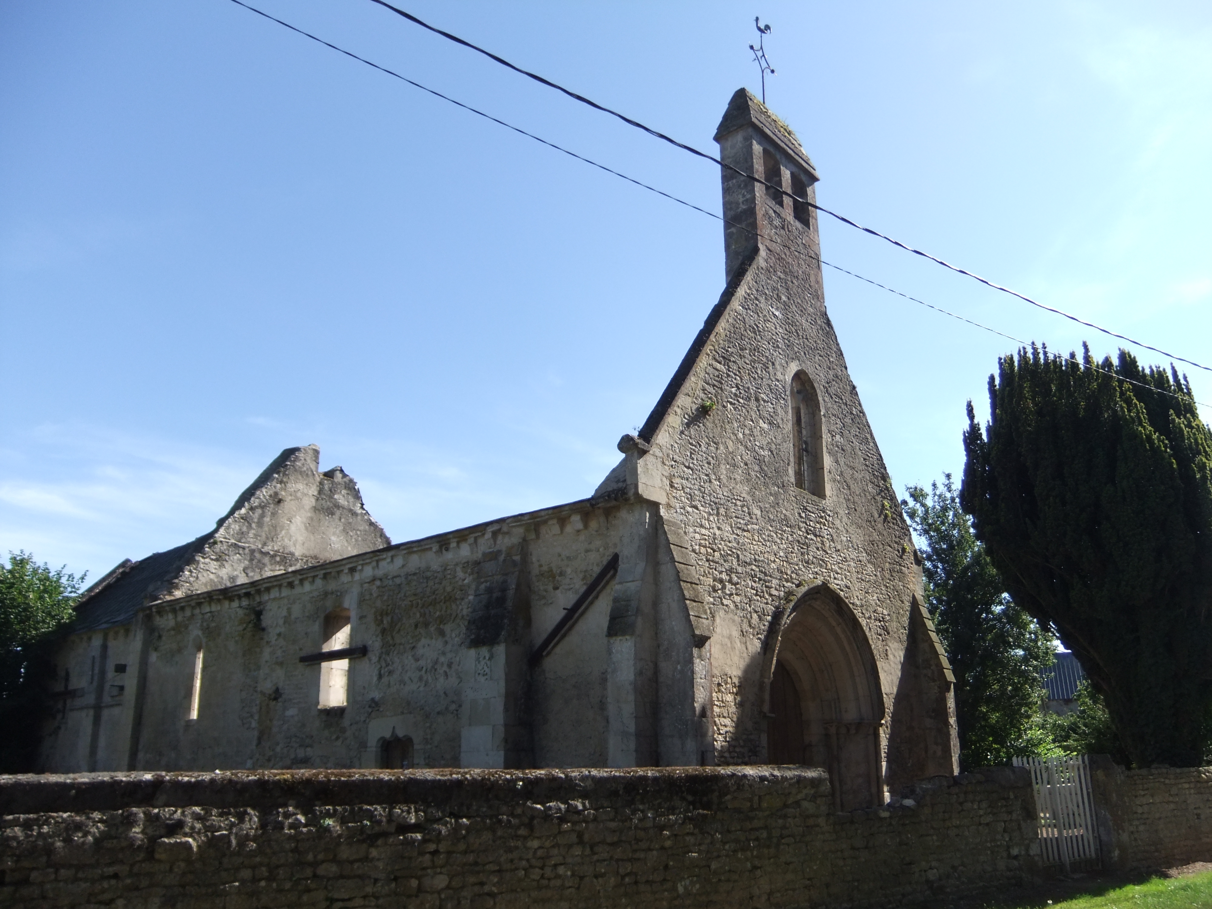 monument historique inscrit .